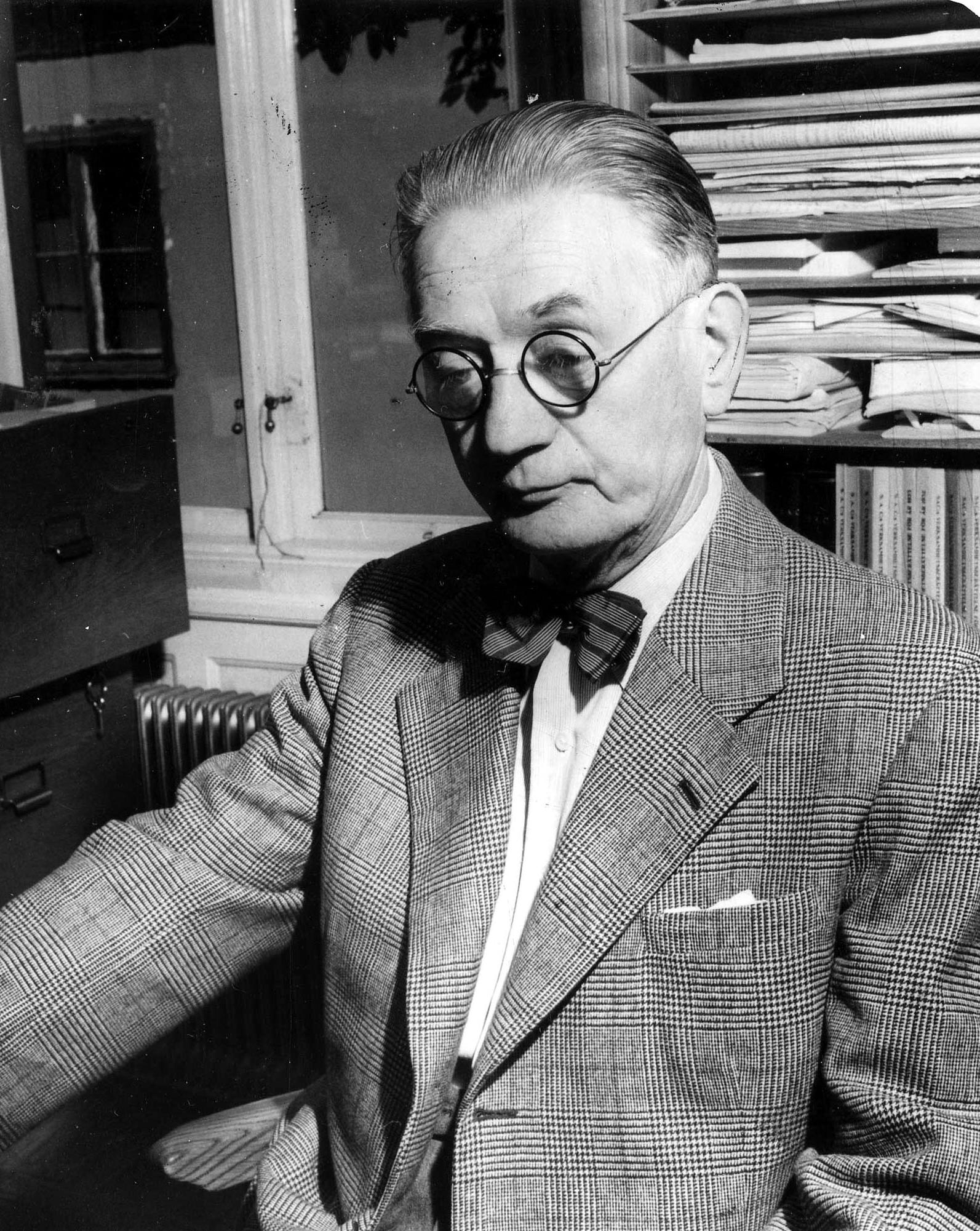 John Andersson, SACs sekreterare 1929-1953